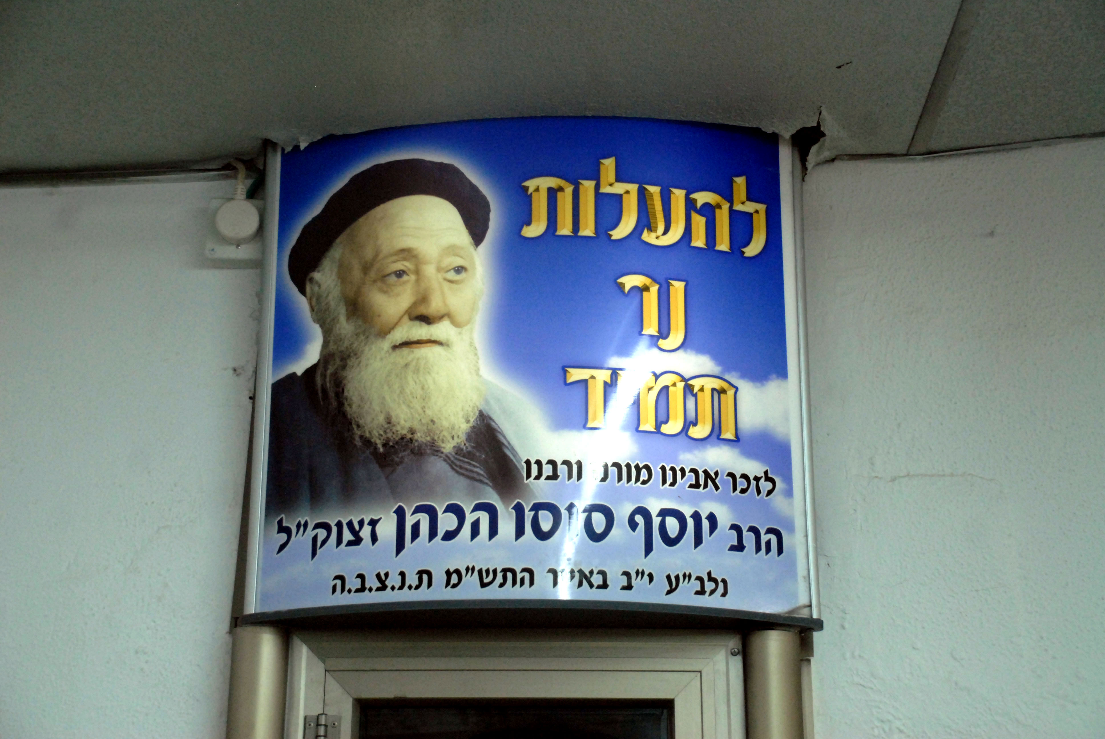 פנים בית הכנסת השלט לכבודו ועם תמונתו של הרב יוסף סוסו הכהן